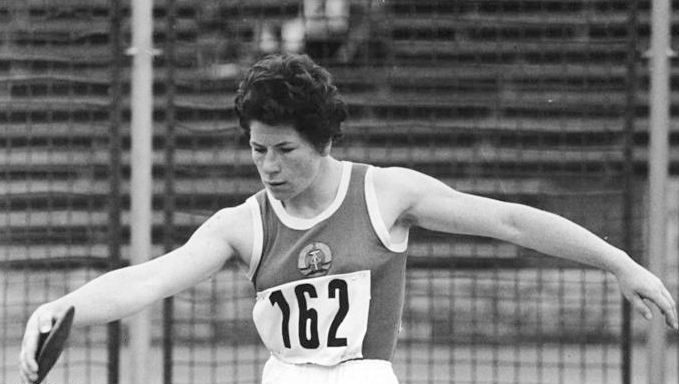 Ingrid Lotz Zentralbild Wendorf 18.04.1969-Berlin: Diskuswerferin Ingrid Lotz aus der Nationalmannschaft verabschiedet-Die Silbermedaillen-Gewinnerin der olympischen Sommerspiele 1964 in Tokio, Ingrid Lotz (SC DHfK Leipzig-Archivfoto) , gehört zu den Leichtathleten, die in einer Feierstunde am 17.04.1969 in Berlin aus der Nationalmannschaft verabschiedet wurden. (siehe ADN-Meldung Nr. 612 v. 17.04.1969)